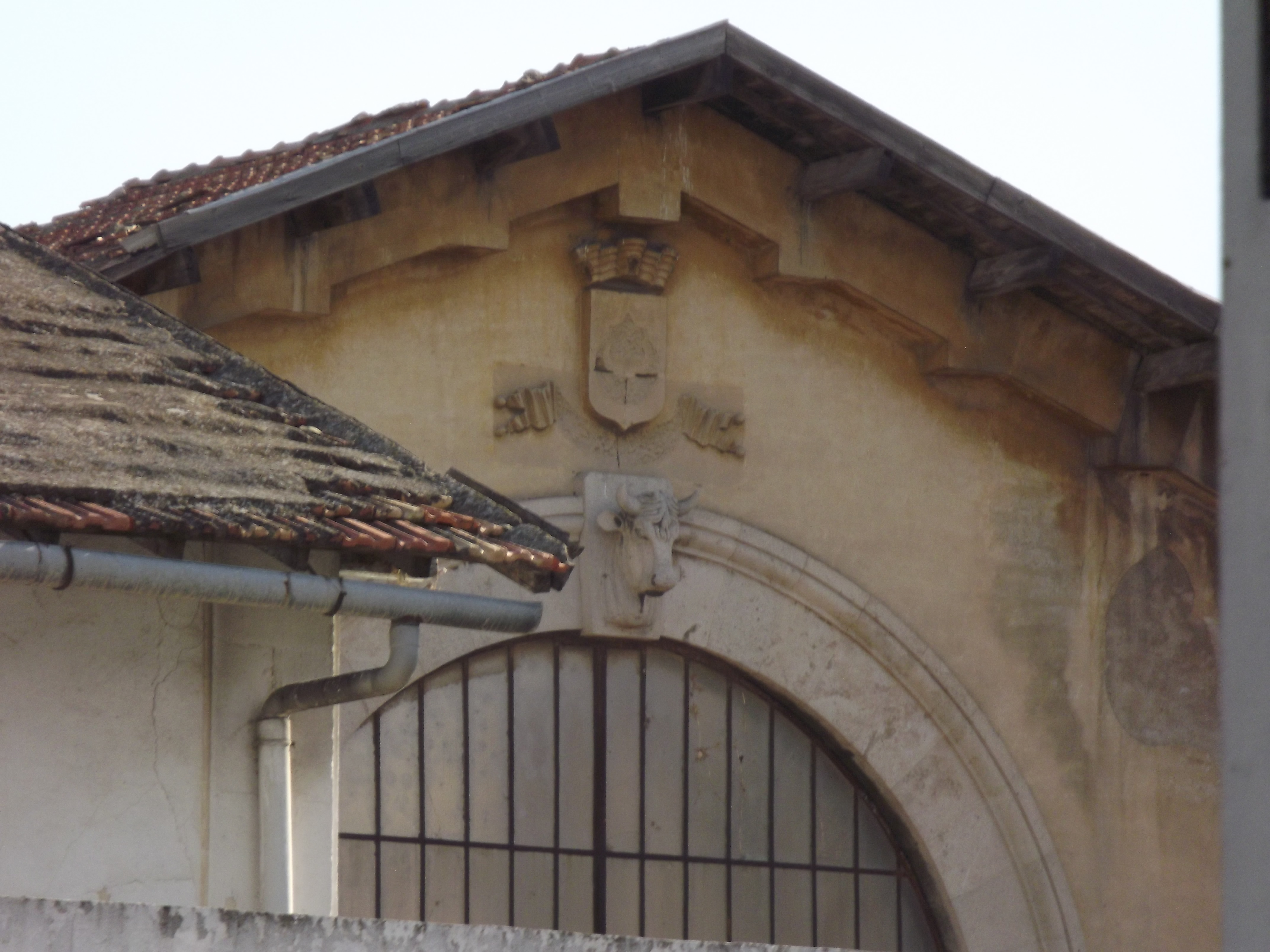 Anciens abattoires de tunis